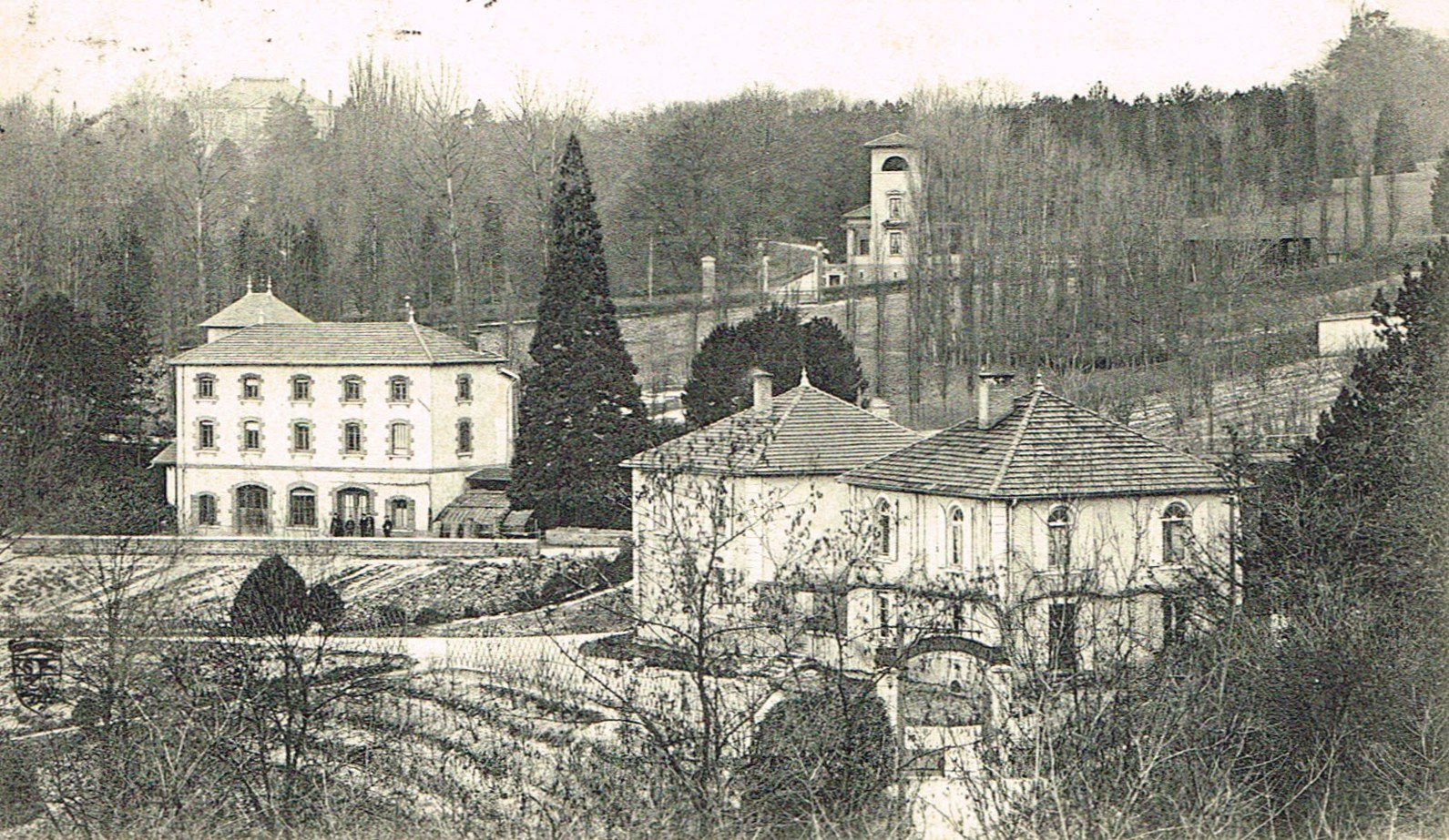 ECULLY, école d'agriculture, vue d'ensemble, début XXe siècle